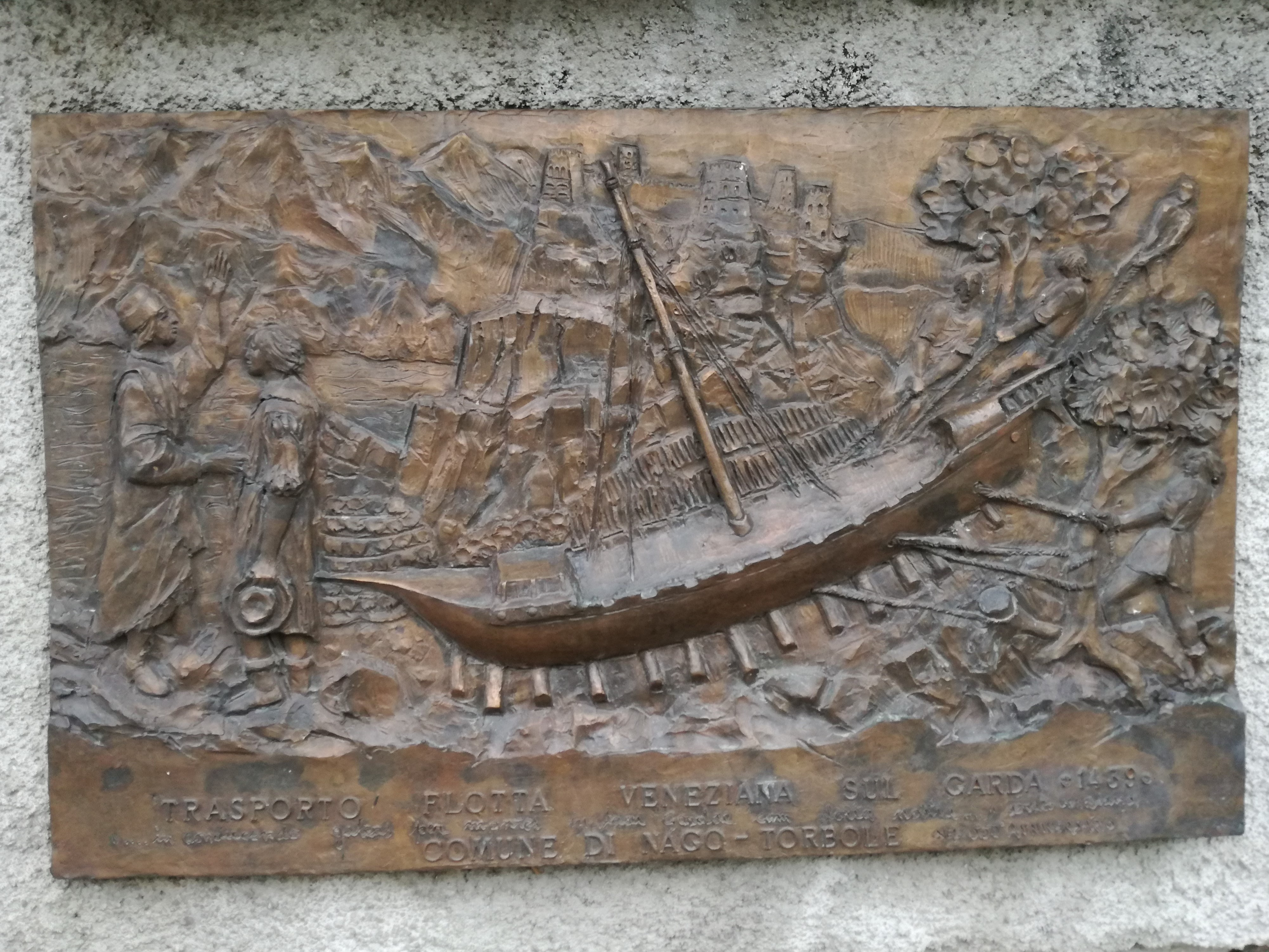 Gedenktafel an den Transport der venezianischen Flotte im Jahr 1439 von der Etsch an den Gardasee